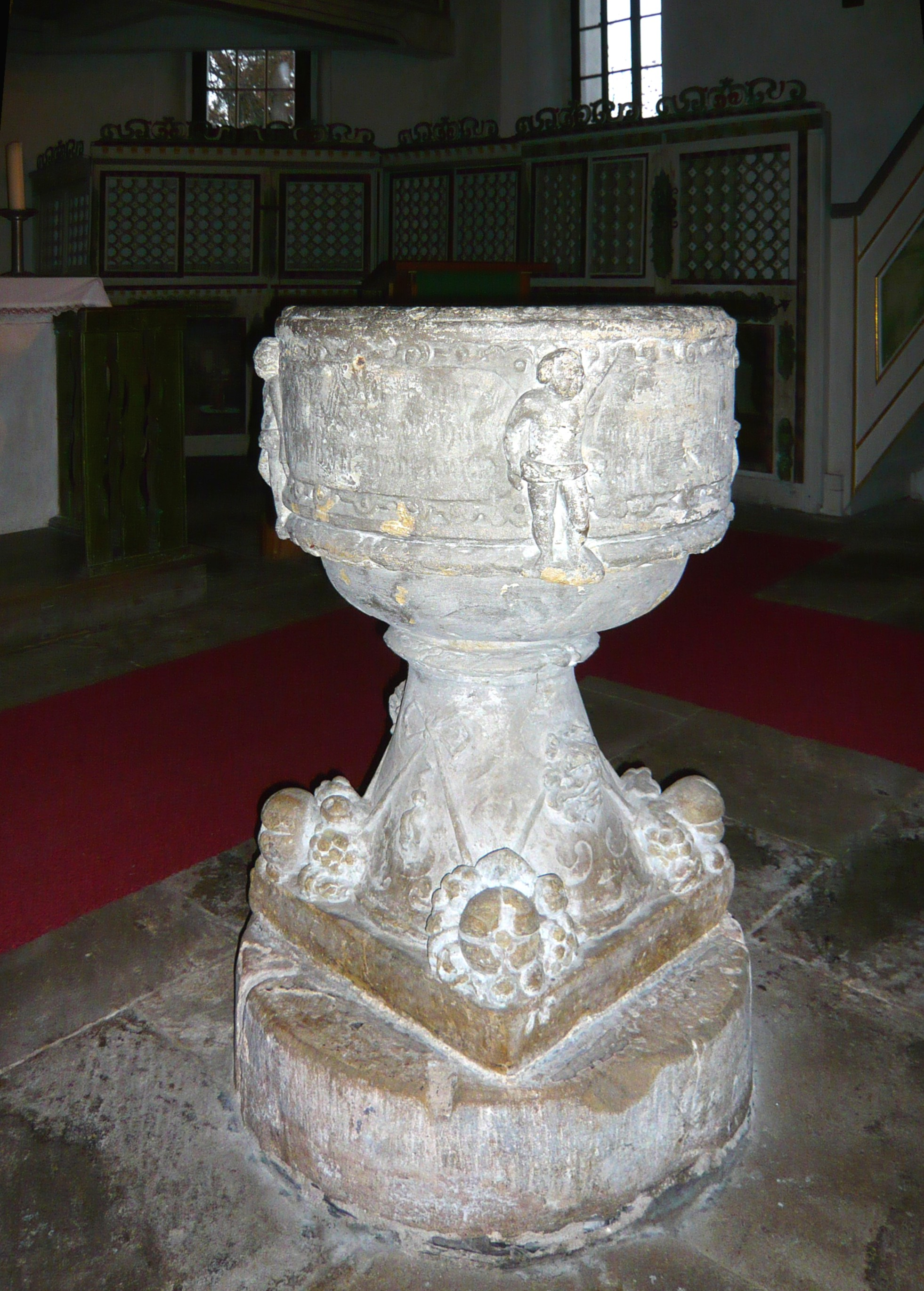 Dorfkirche Schellerhau, Taufstein